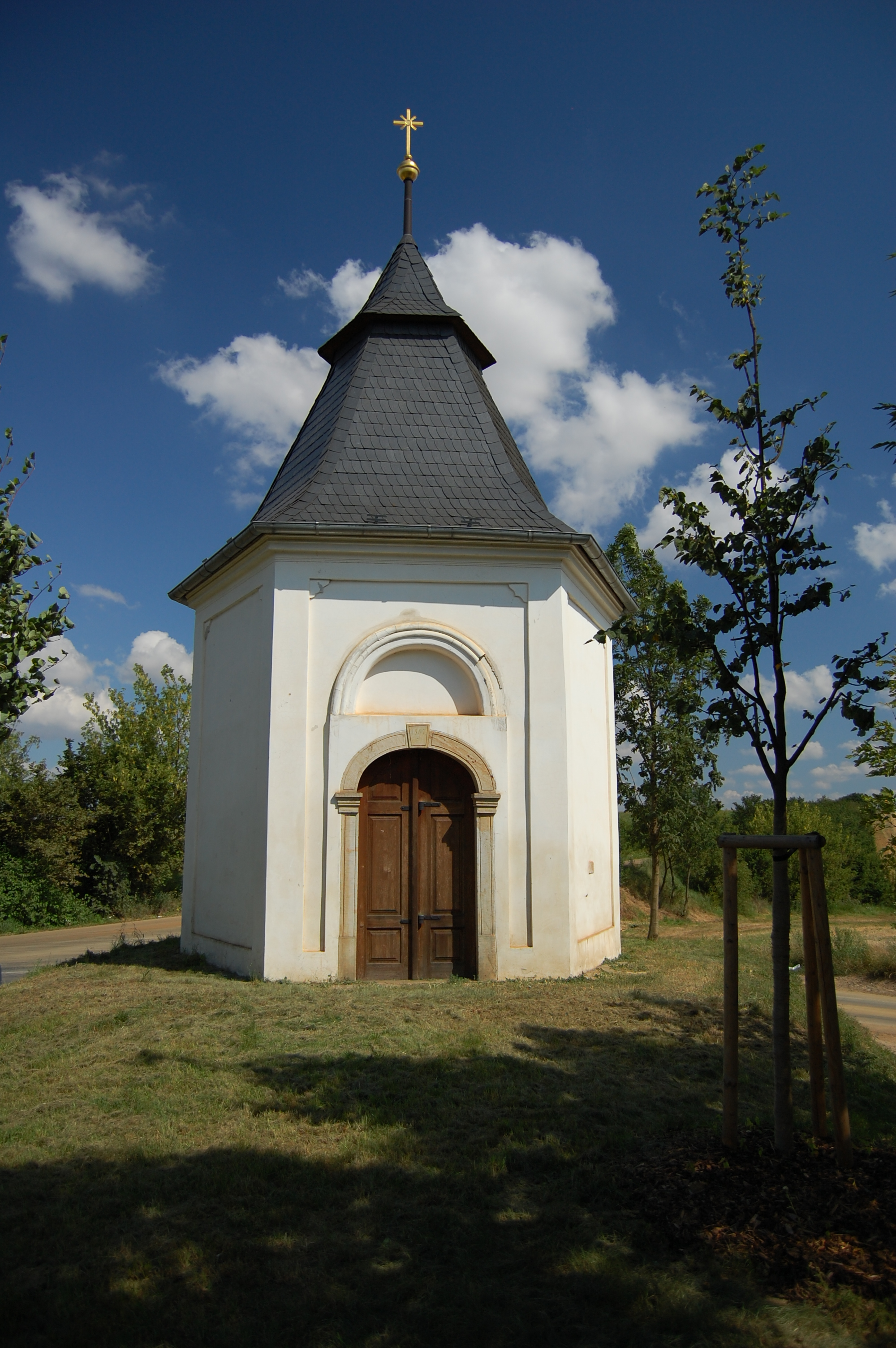 Kaple svatého Floriána nad vesnicí, Držovice, okres Prostějov